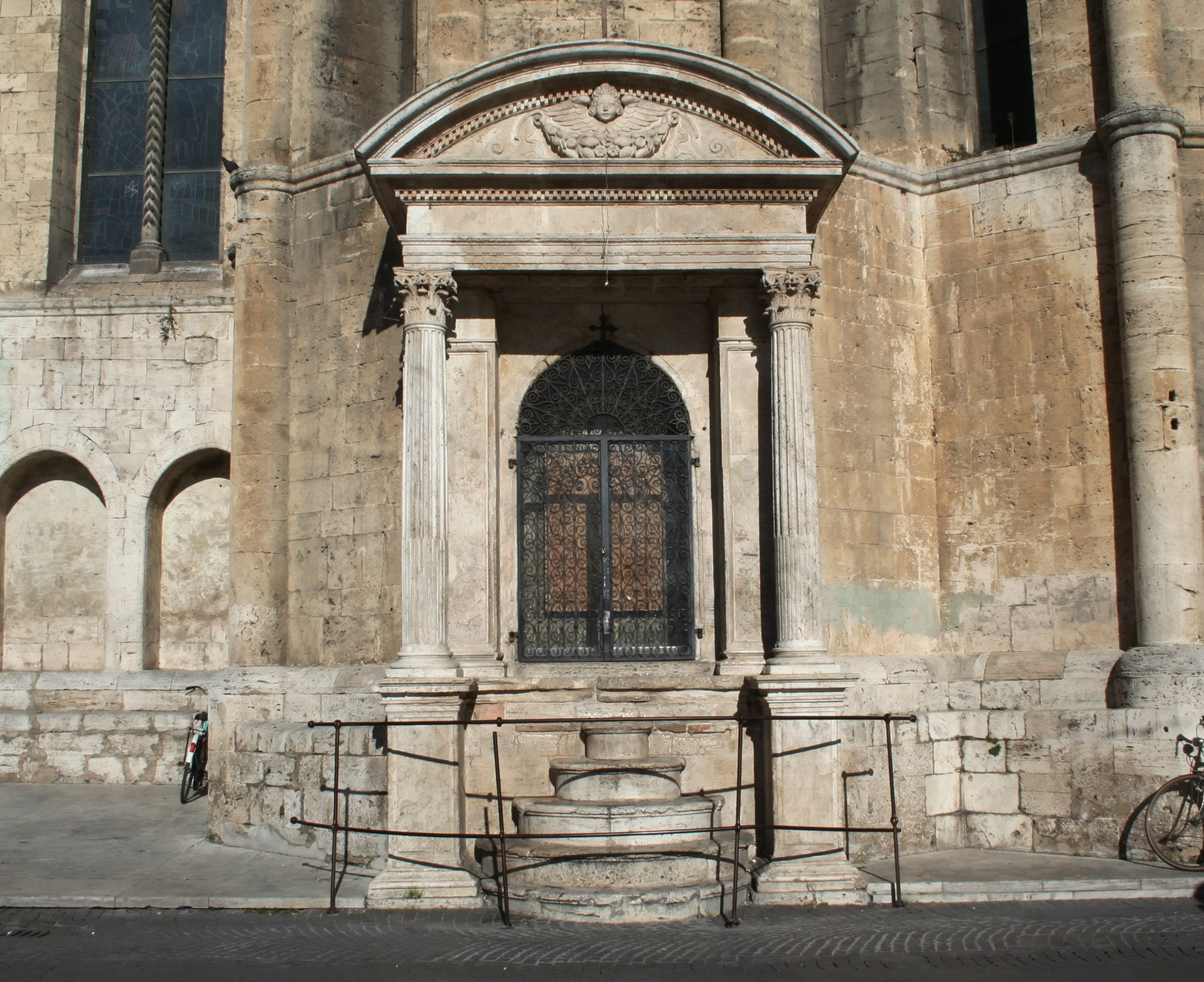 Edicola barocca Morelli 2006 proprio scatto dicembre 2006 Sibilla.io "Utilizzo concesso" This file is licensed under Creative Commons 3.0 license